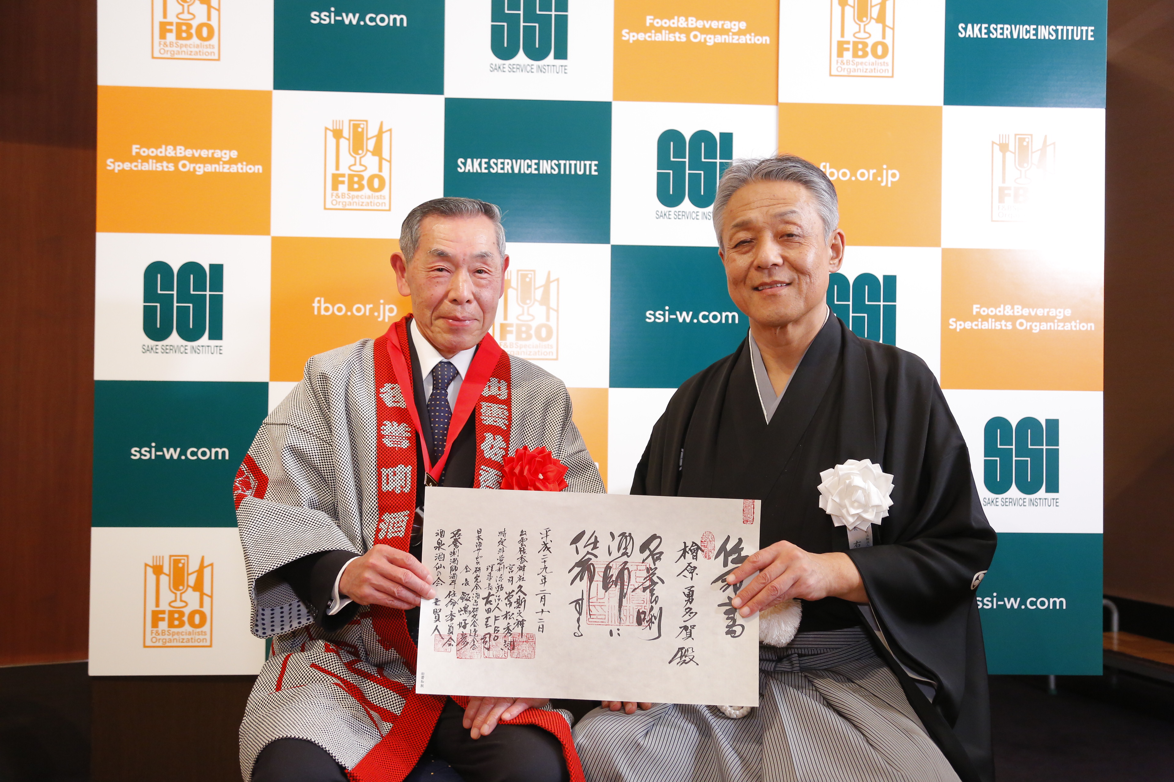 名誉唎酒師任命式